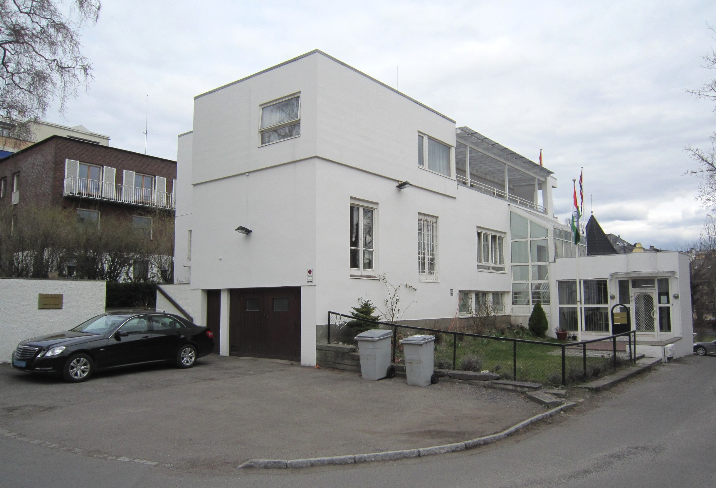 Indias ambassade i Niels Juels gate 30 i Oslo